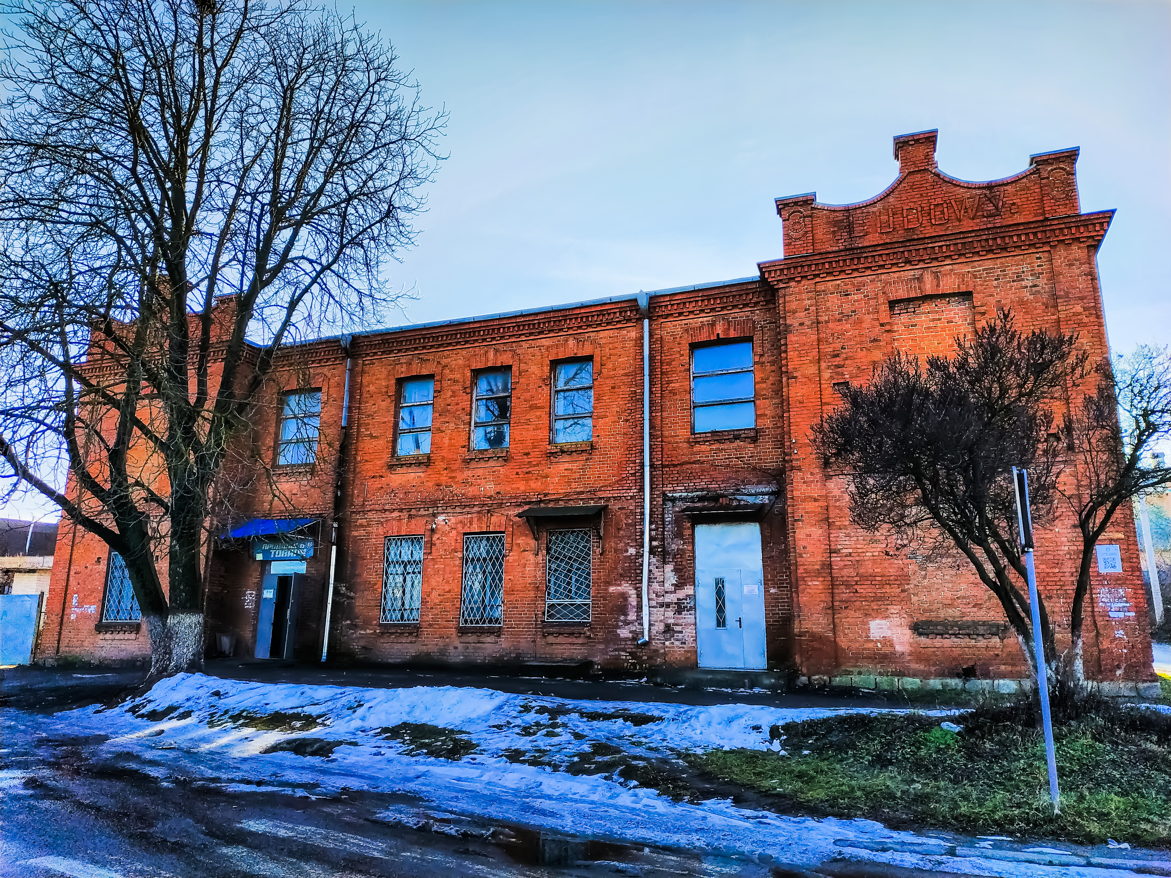 Колишній польський народний дім у Гречанах, вул. Вокзальна, 59